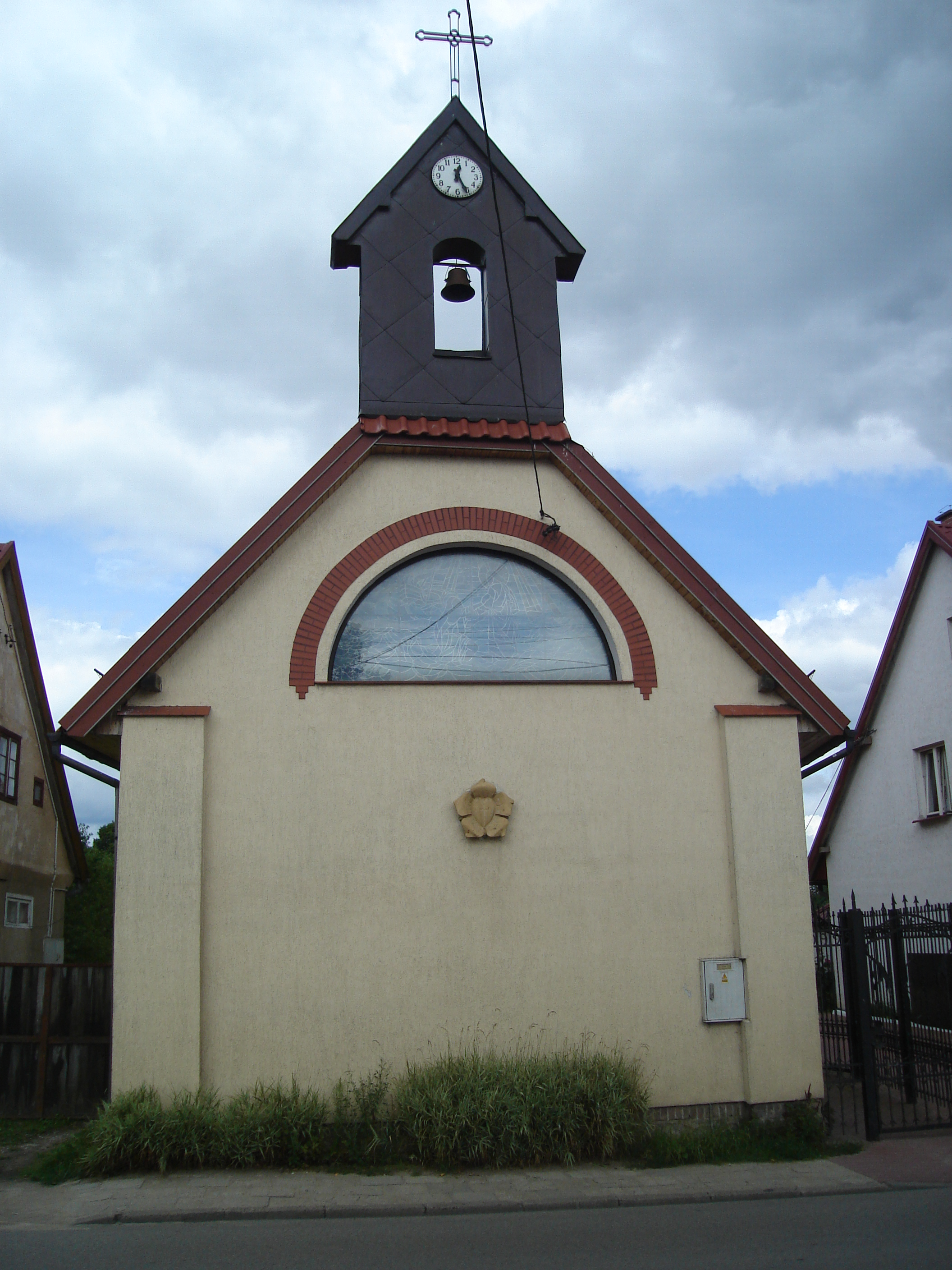 Kaplica Kościoła Ewangelicko-Augsburskiego w Ukcie